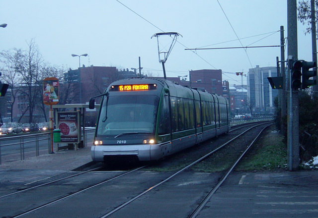 Tram - Milano